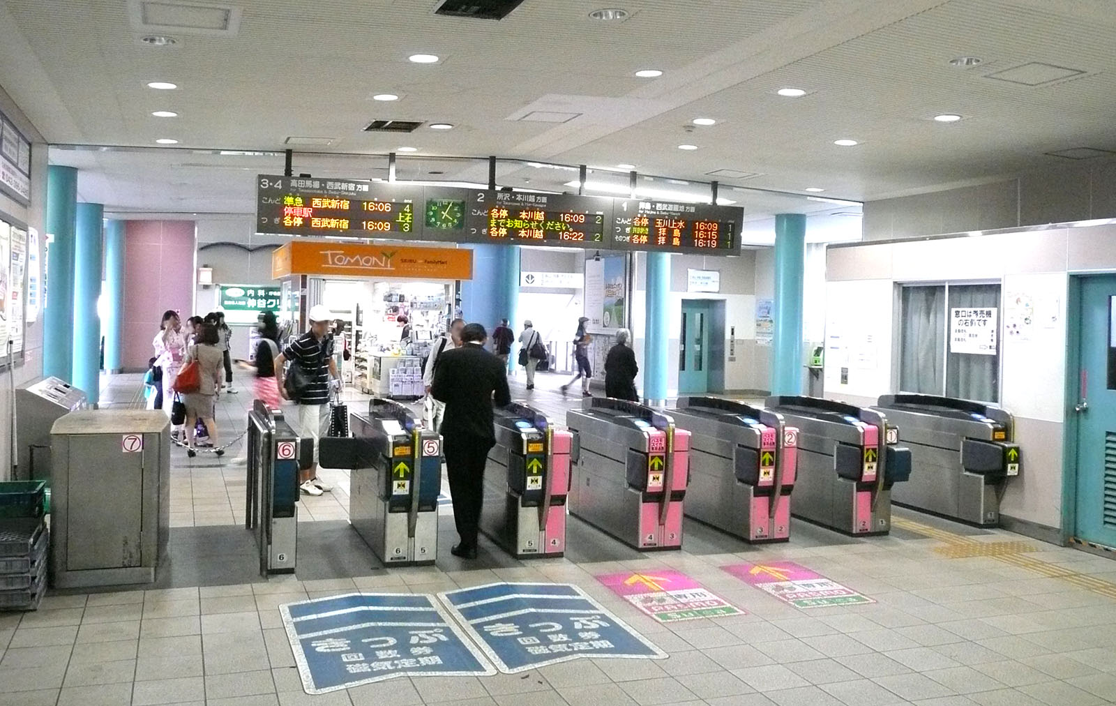 小平駅改札口